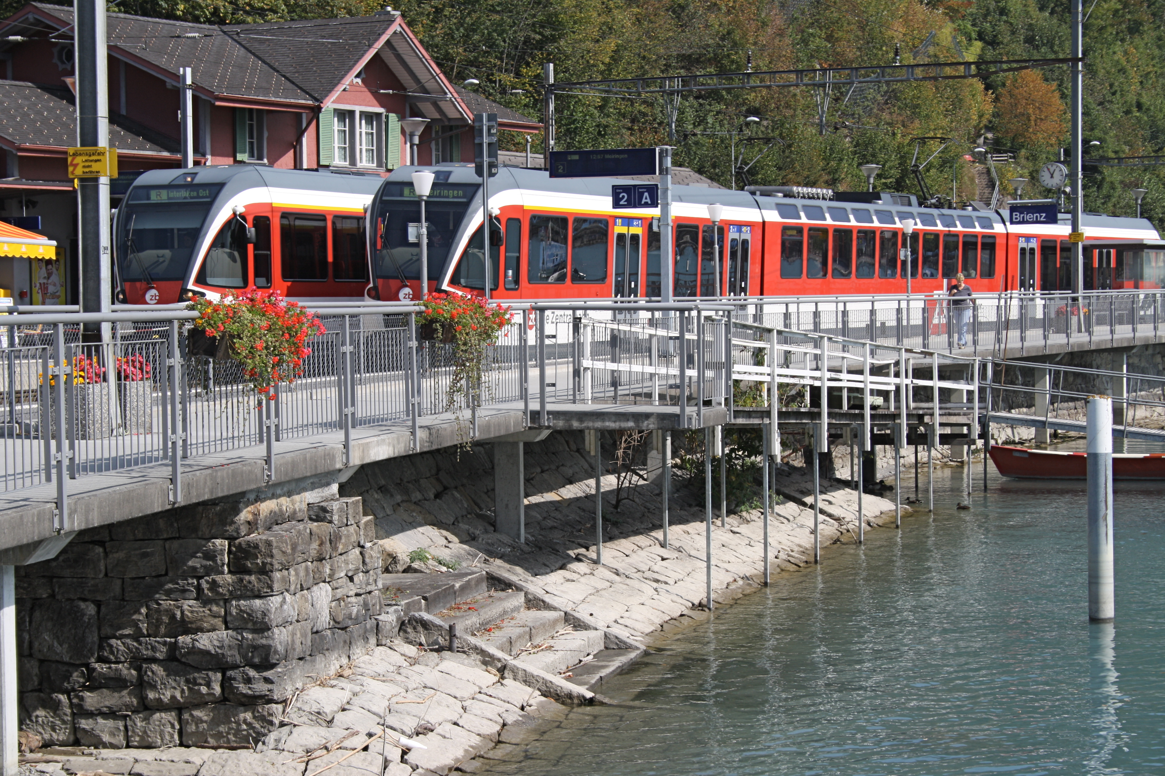 Zugkreuzung in Brienz. Die Fahrzeuge sind Spatz-Triebwagen.